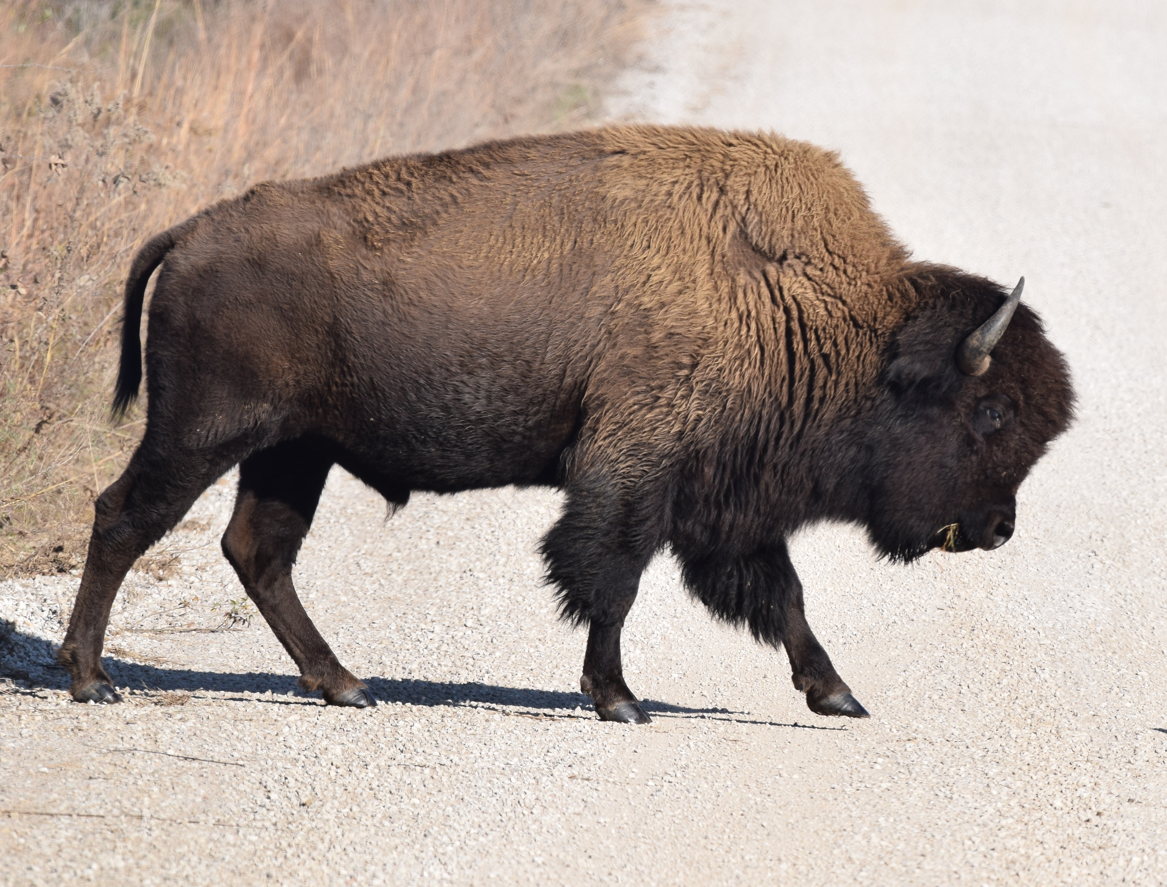 Prairie State Park